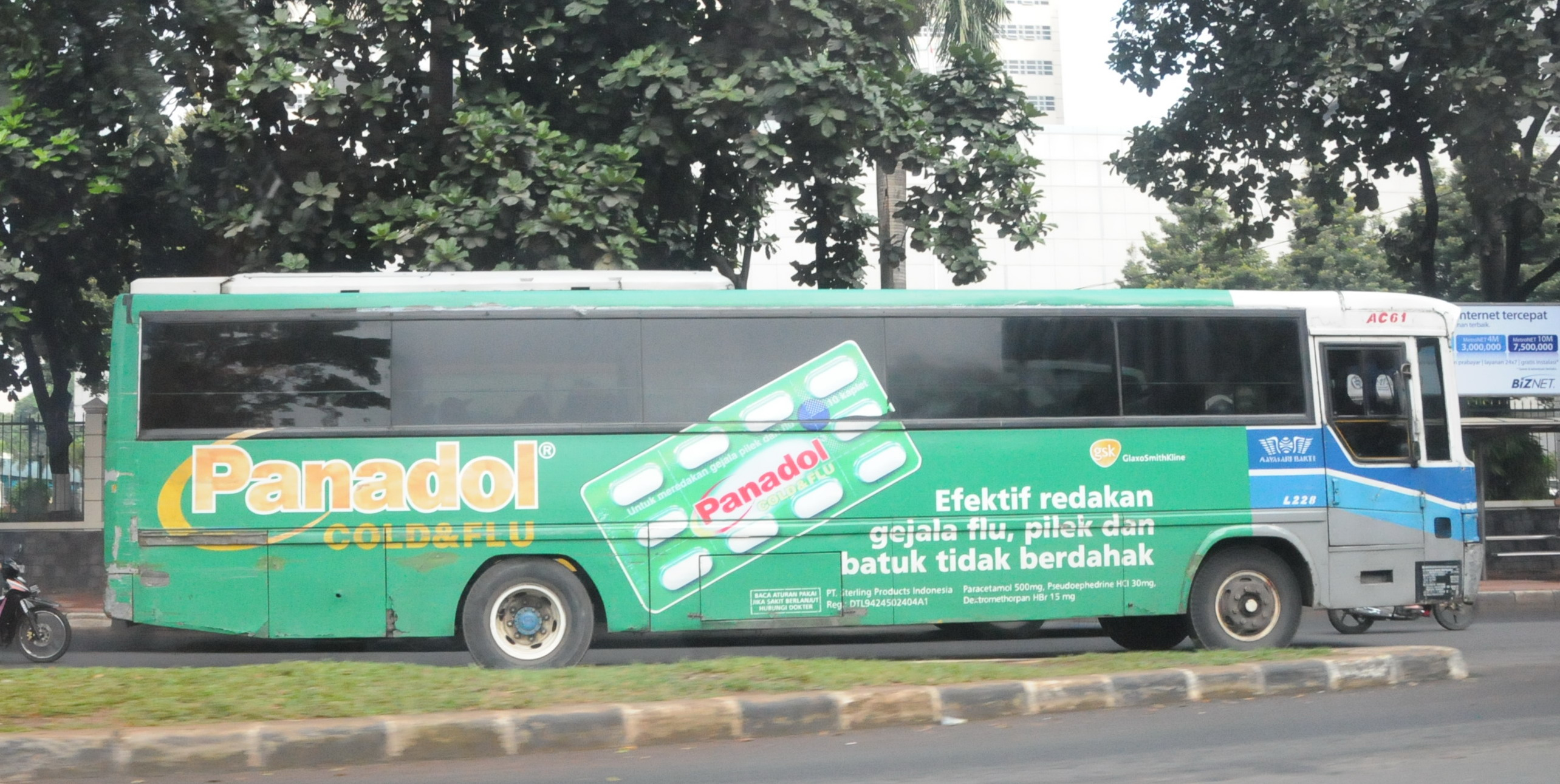 Bus Kota